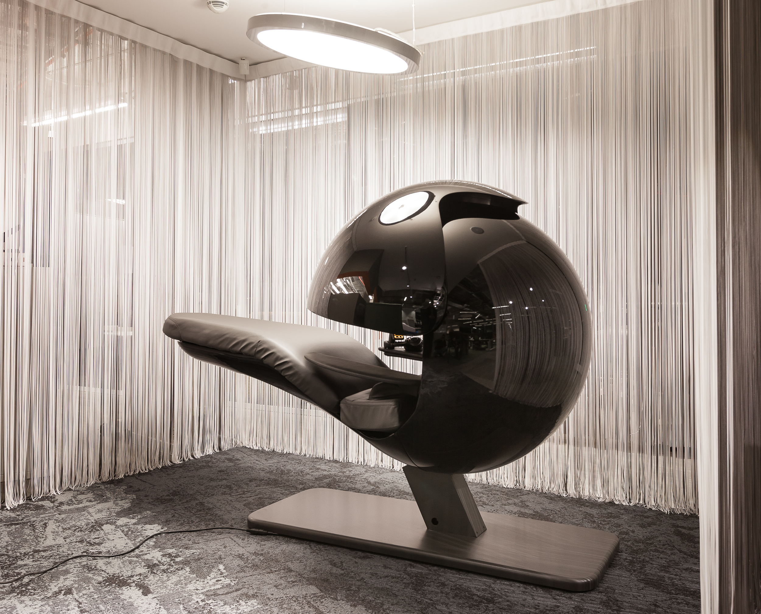 Капсула для сна PrivateNap в офисе компании